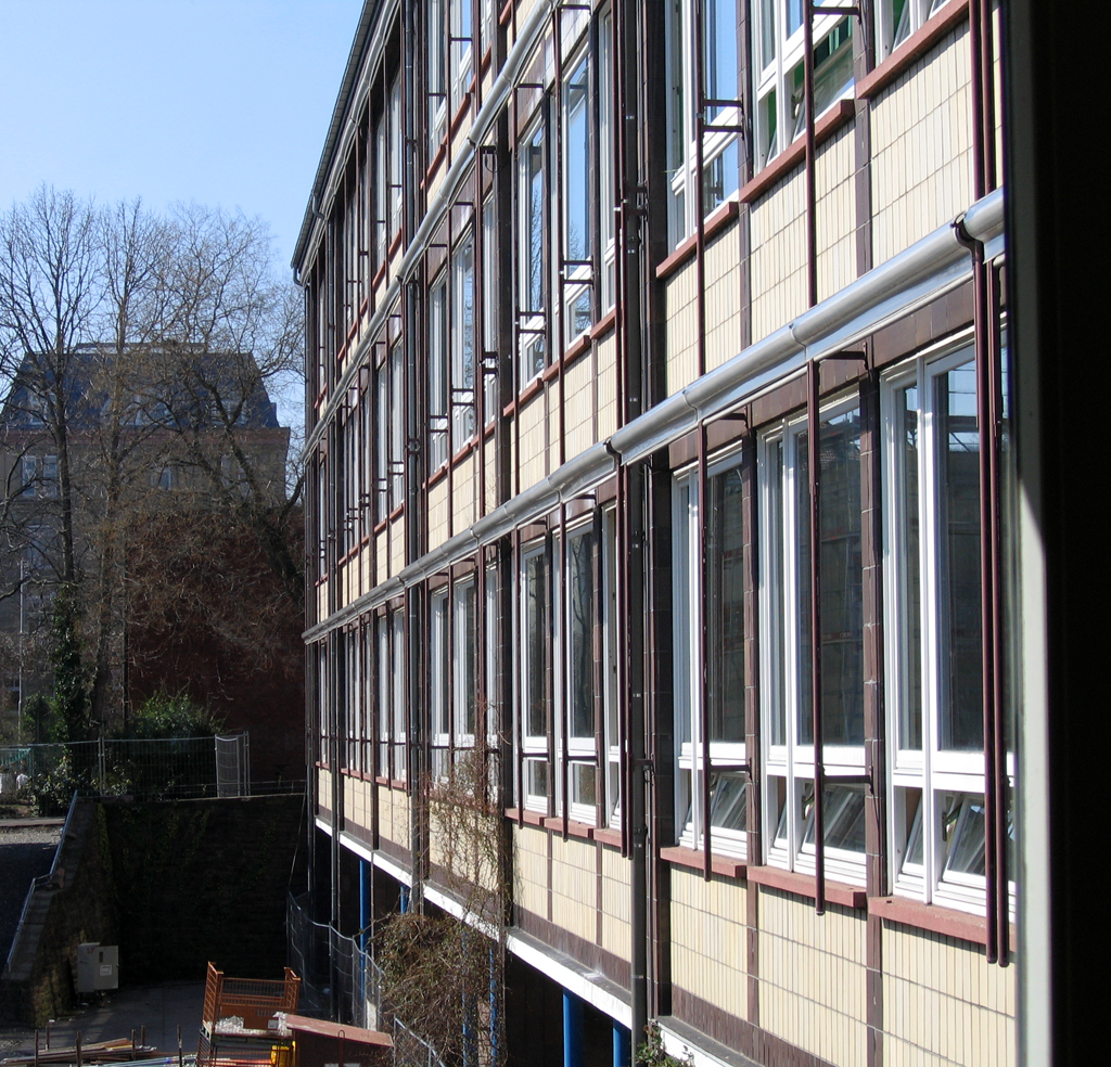 Außenansicht Friedrich-Eugens-Gymnasium